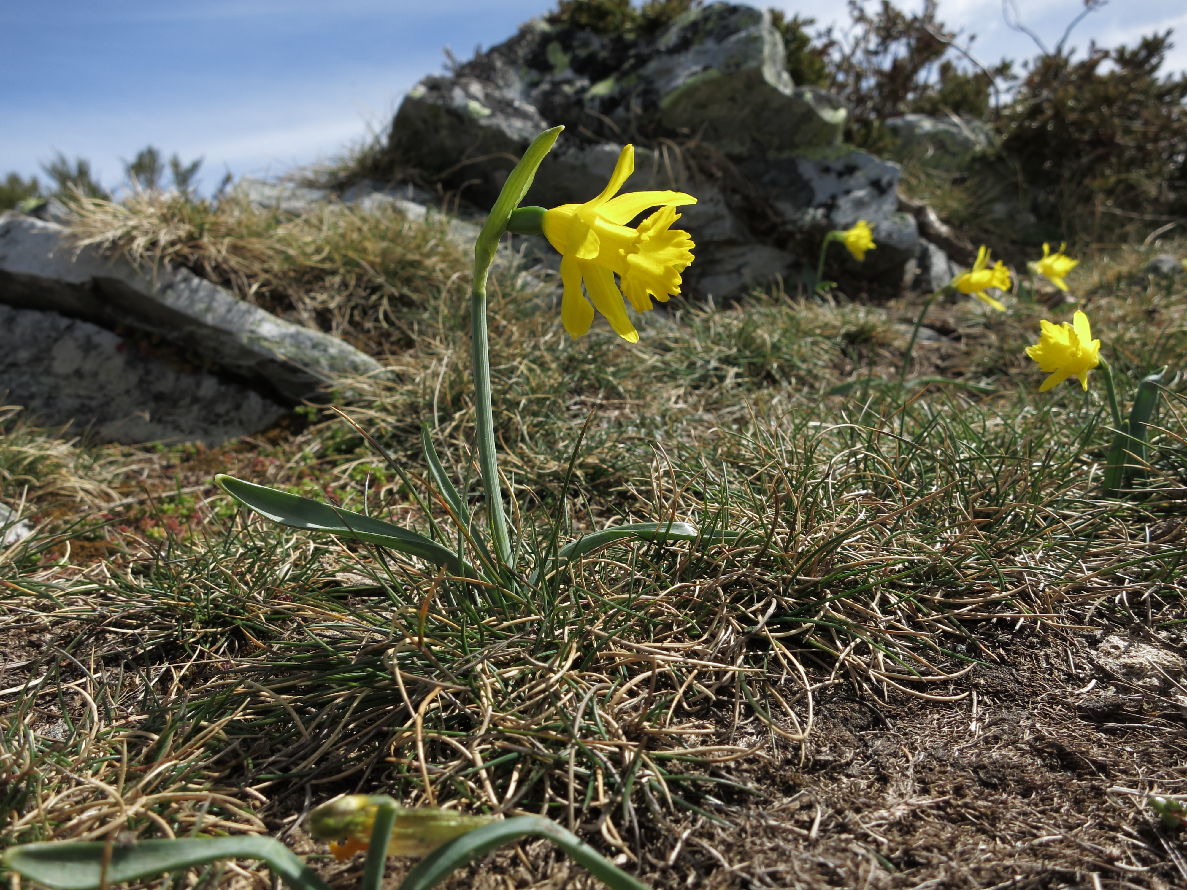 Narcissus asturiensis, Montes Ancares, Ponferrada, León, España